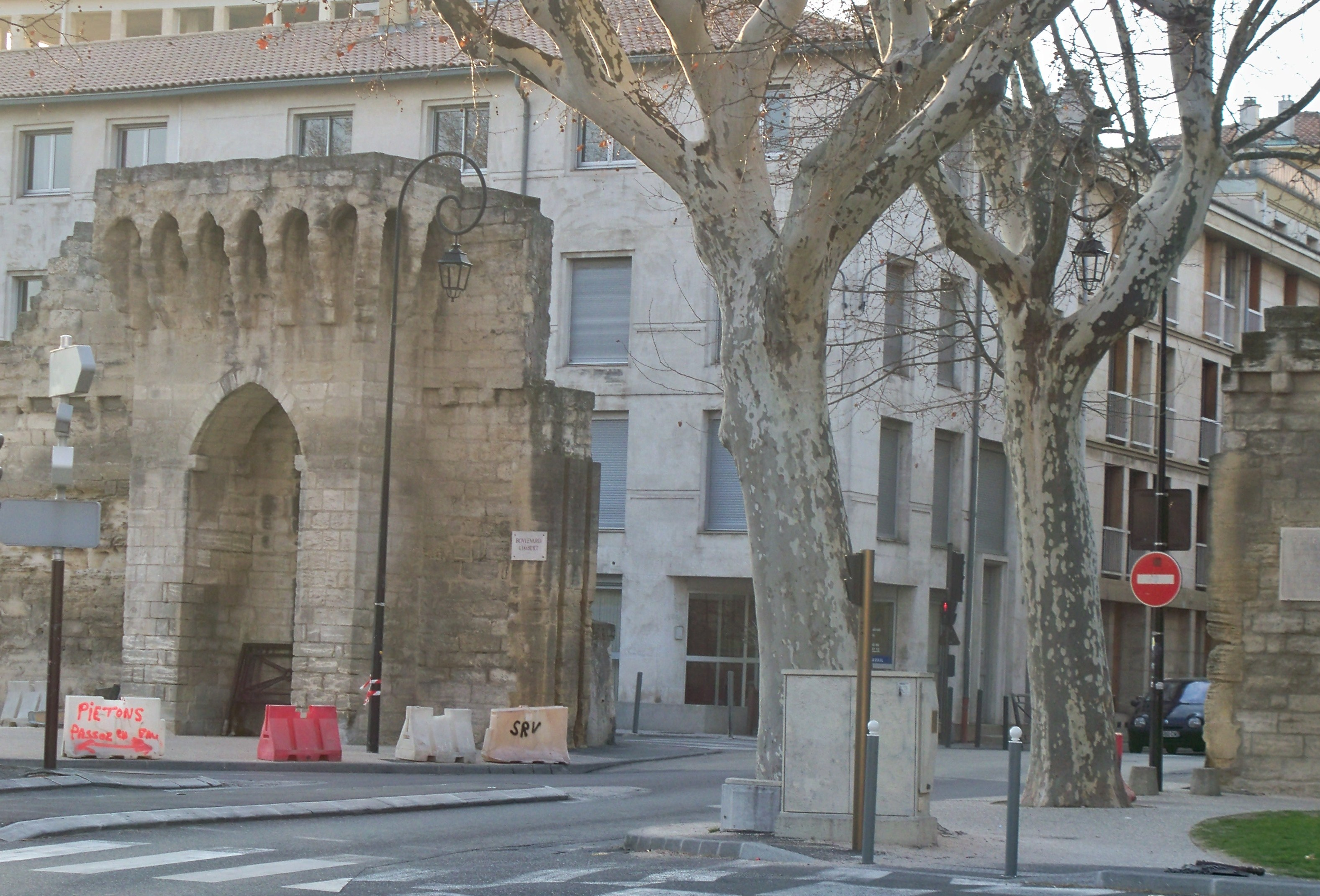 Porte de Thiers, Avignon (84) France